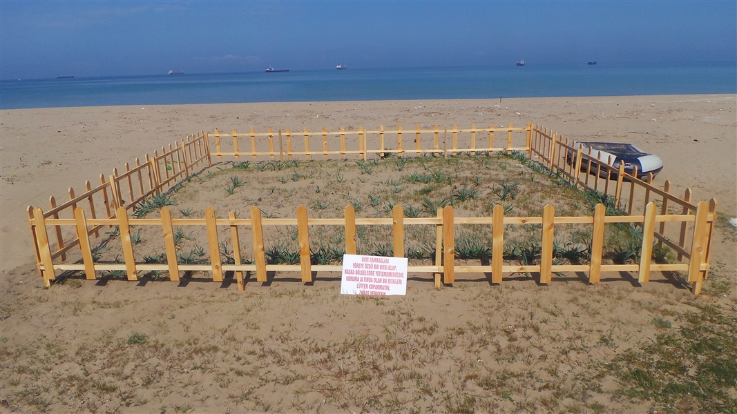 Koruma altına alınan kum zambakları (İnkumu Plajı)